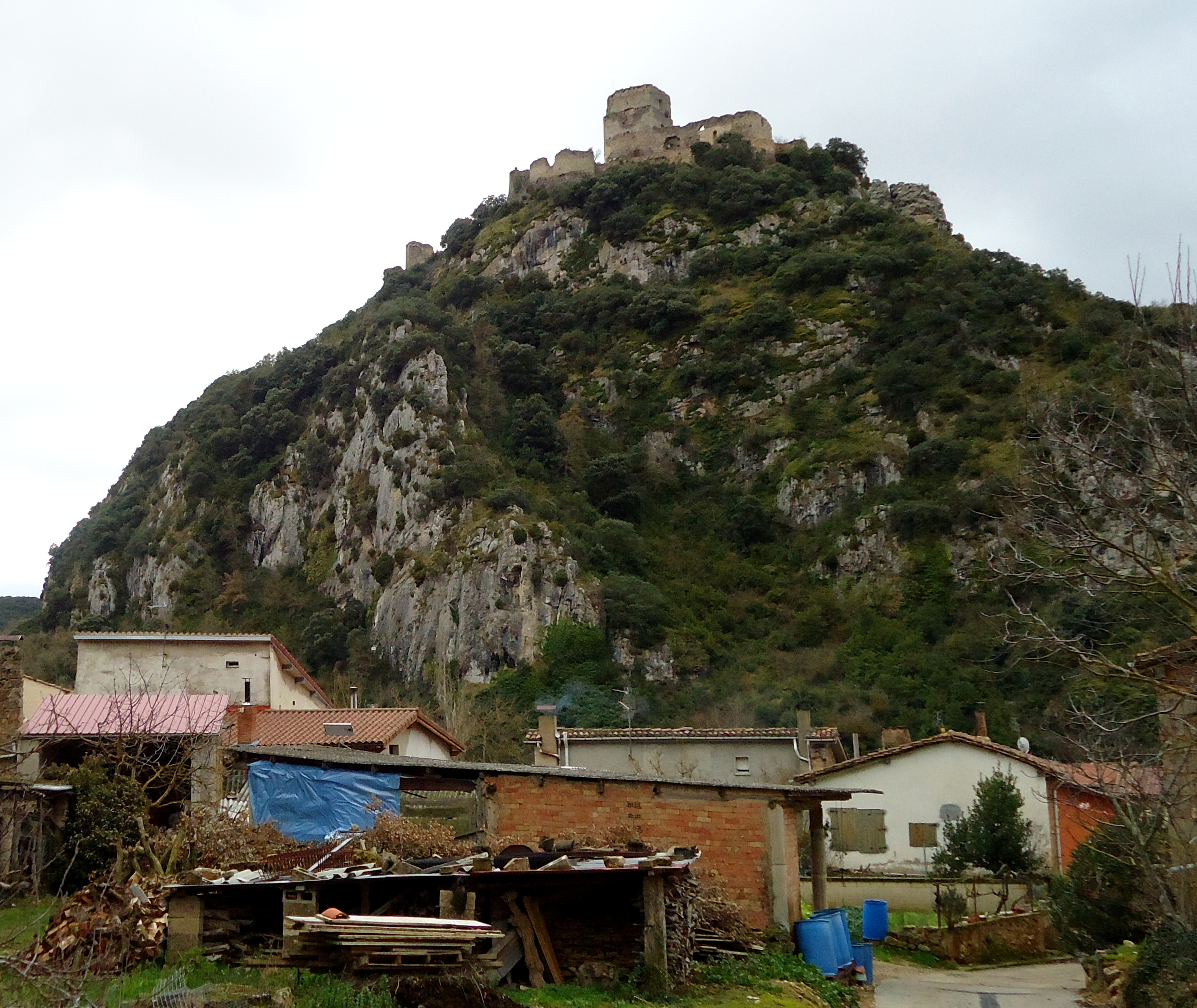 Ocio herriaren gainean dagoen Lanosko gaztelua